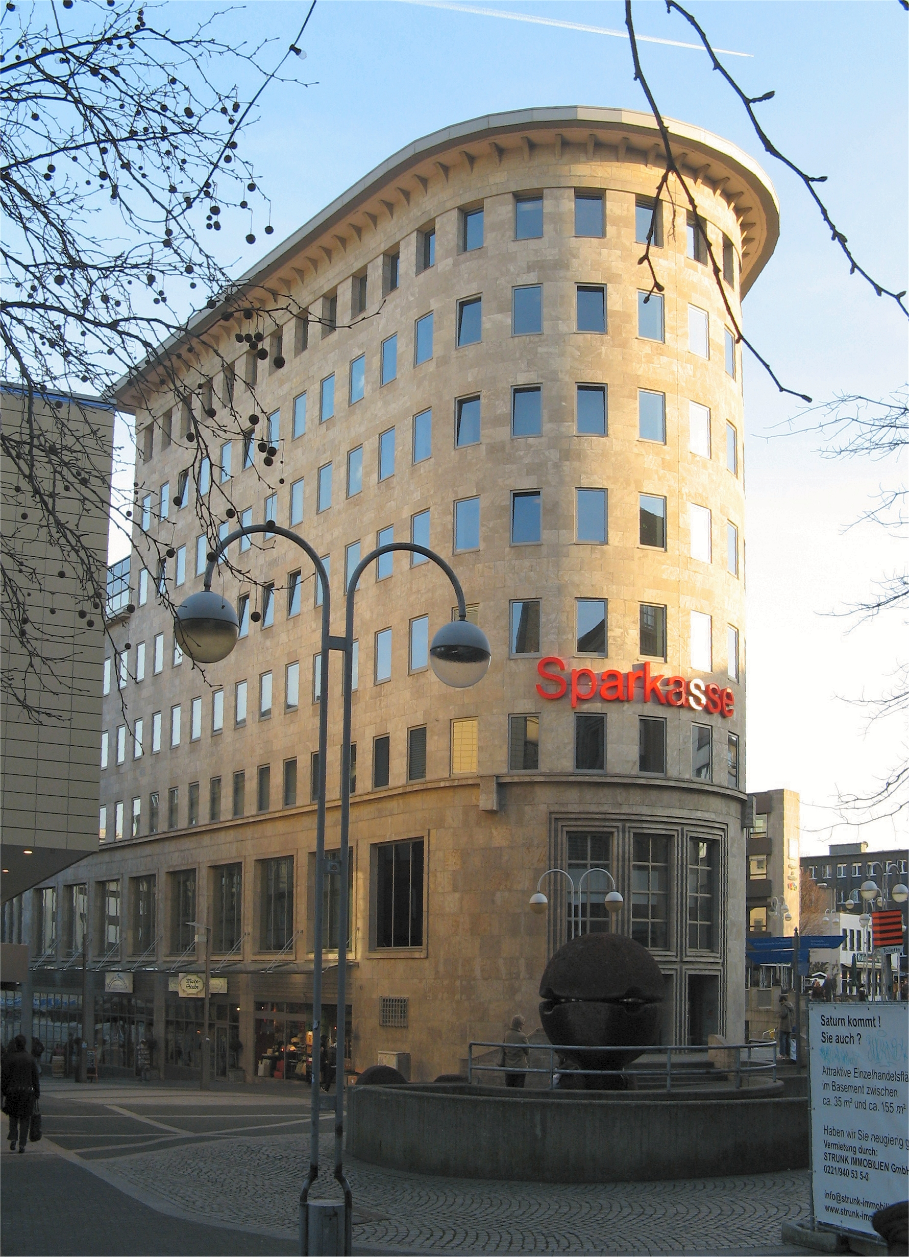 Sparkassen Gebäude, Dr.-Ruer-Platz, Bochum. Build in 1928-1929 as Kommunalbank, Architect Wilhelm Kreis